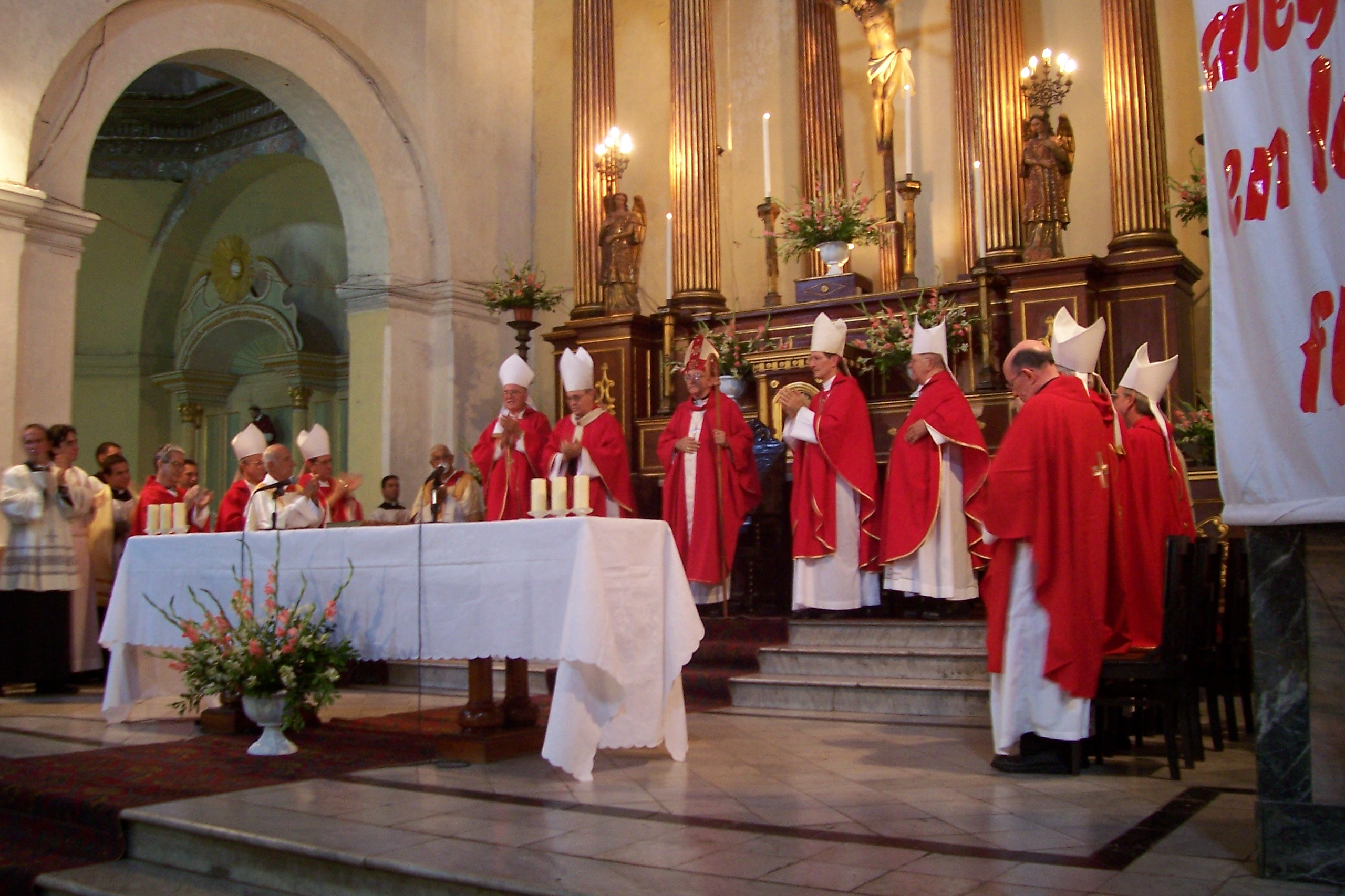 Toma de posesión del obispo Manuel Hilario de Céspedes en la Catedral de Matanzas.